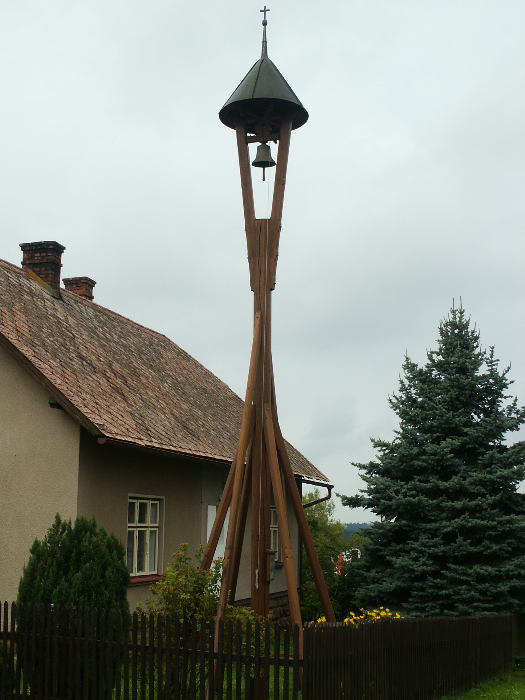 Studénka - zvonička před č.p. 10